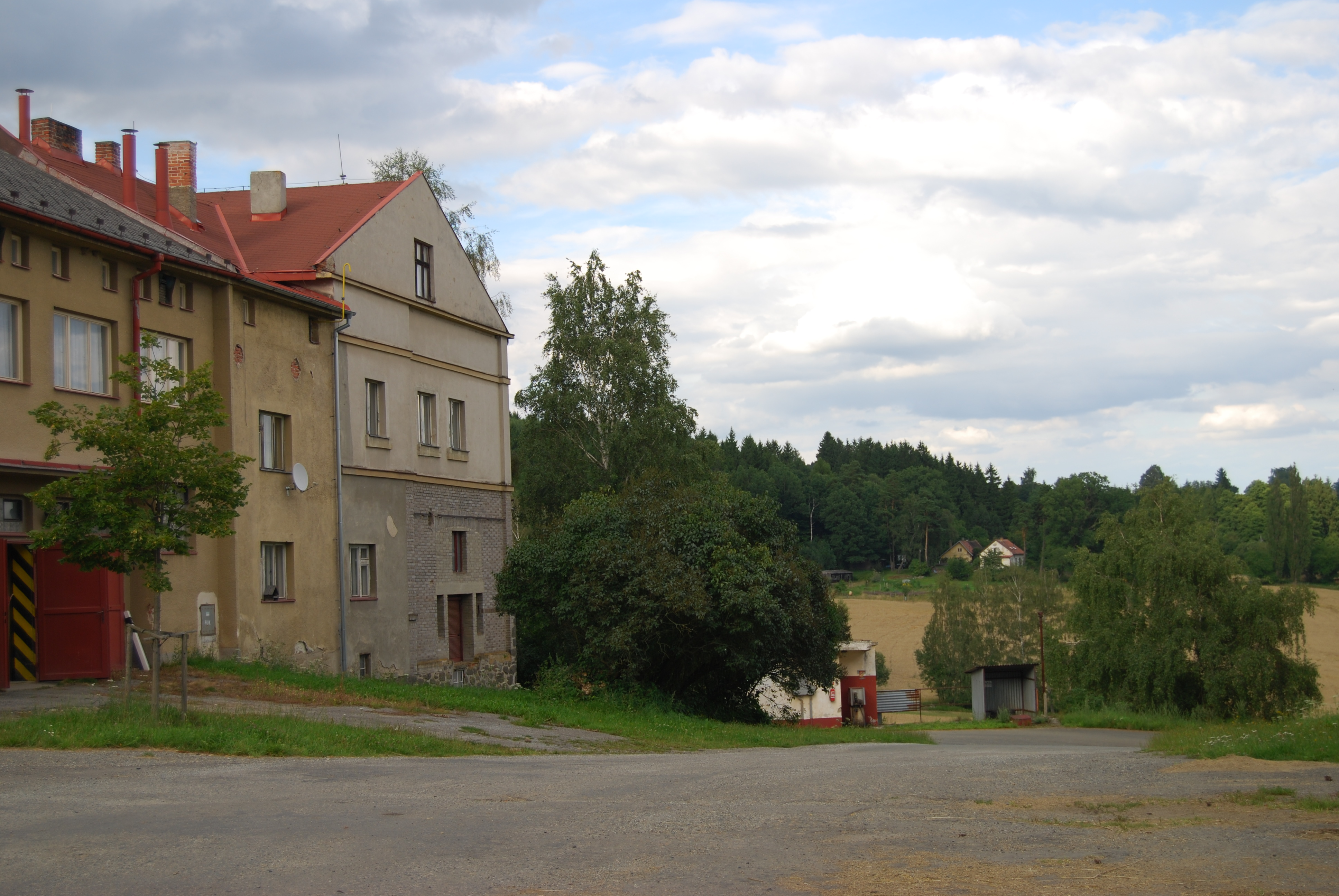 Větrov je část obce Nadějkov v okrese Tábor. Česká republika.